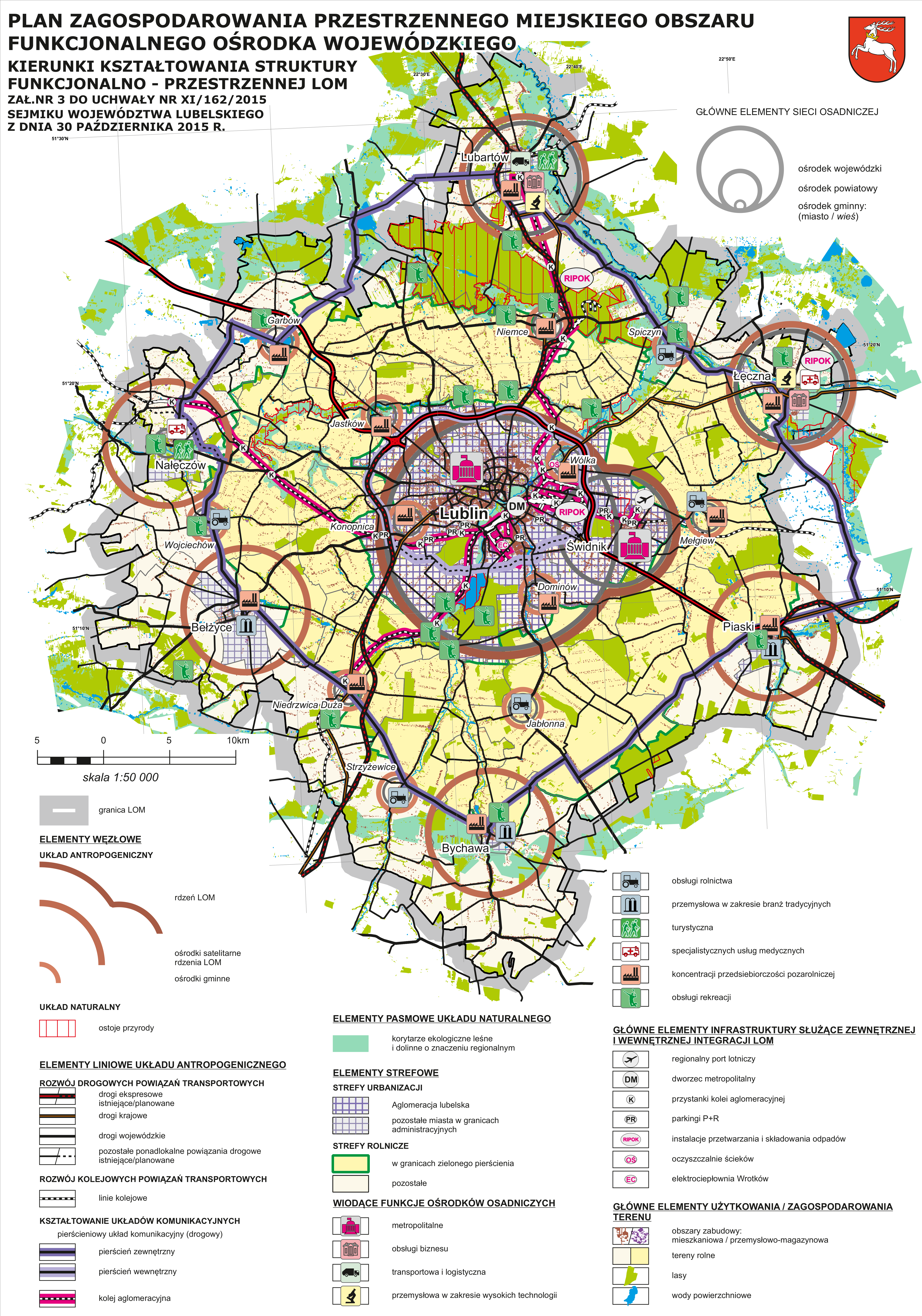 Kierunki kształtowania struktury funkcjonalno-przestrzennej Lubelskiego Obszaru Metropolitalnego